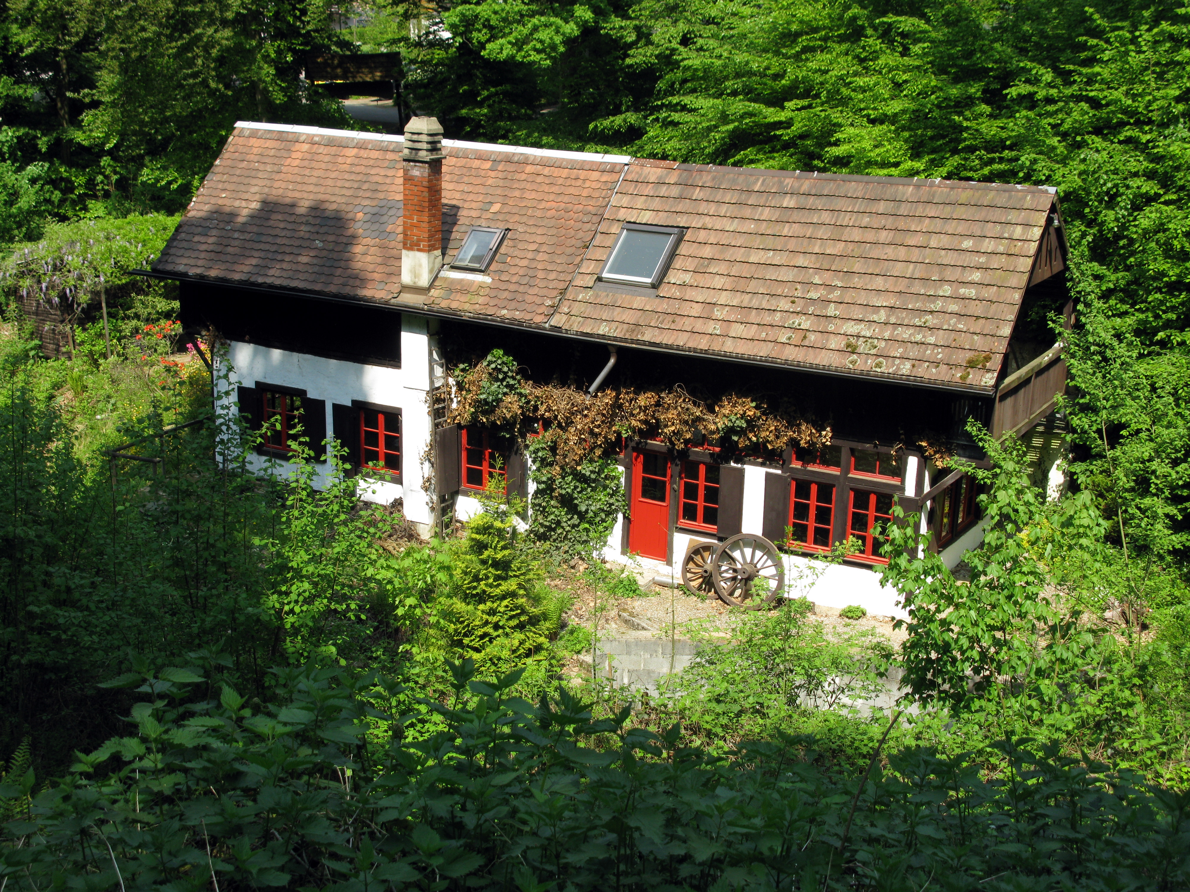 im Altbachtal in Freiburg-Zähringen